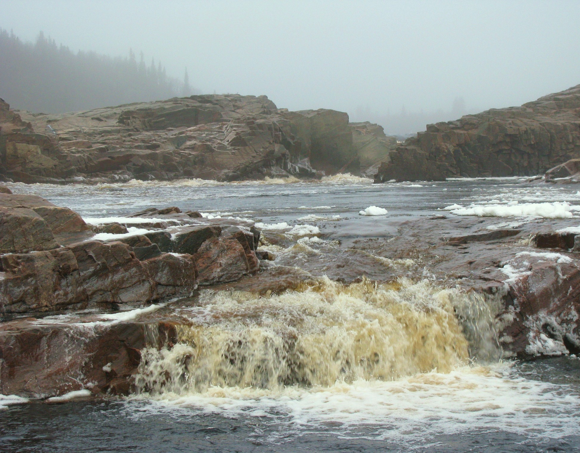 Шуга на Стрельне